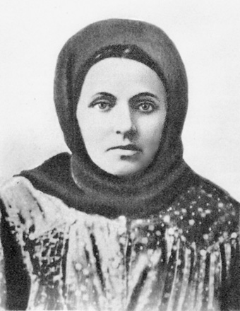 Марія Василівна Тичина: мати поета Павла Тичини